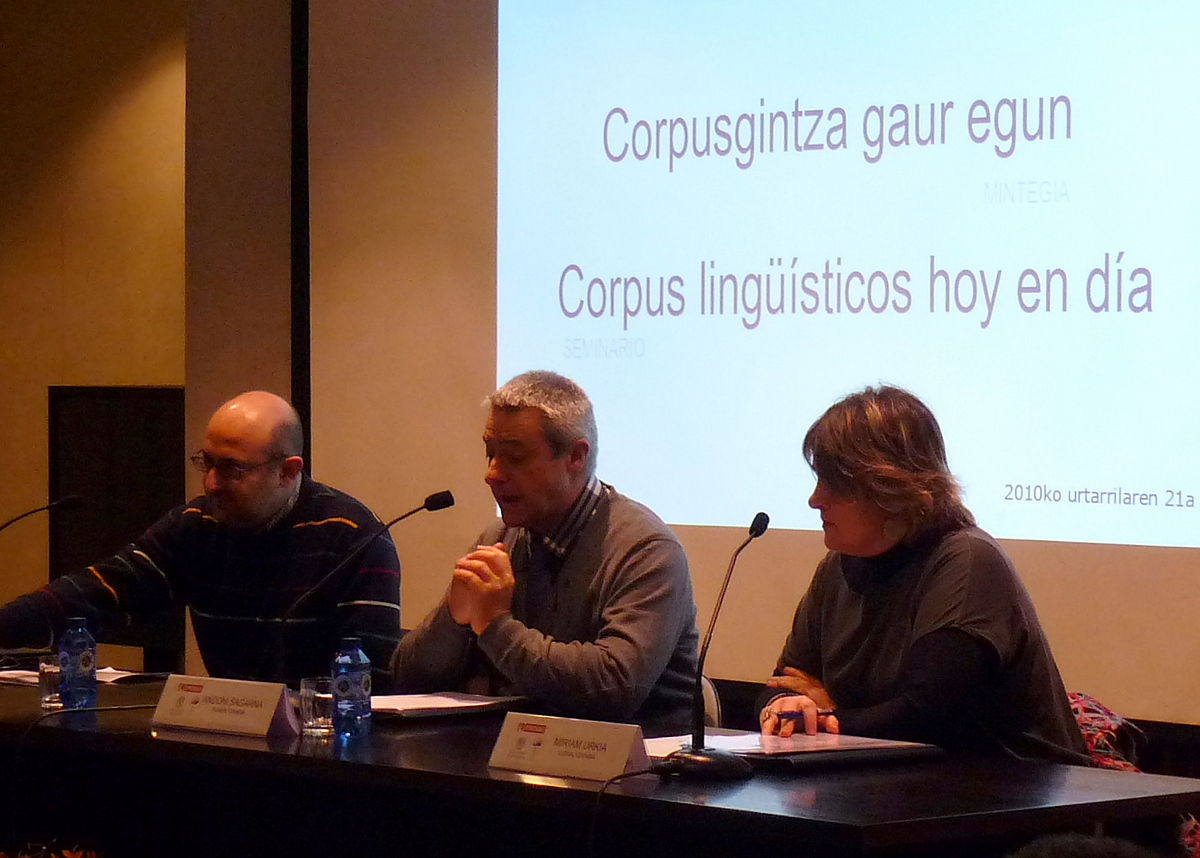 1:Andoni Sagarna (middle), Xabier Gomez (left), and Miriam Urkia (right).